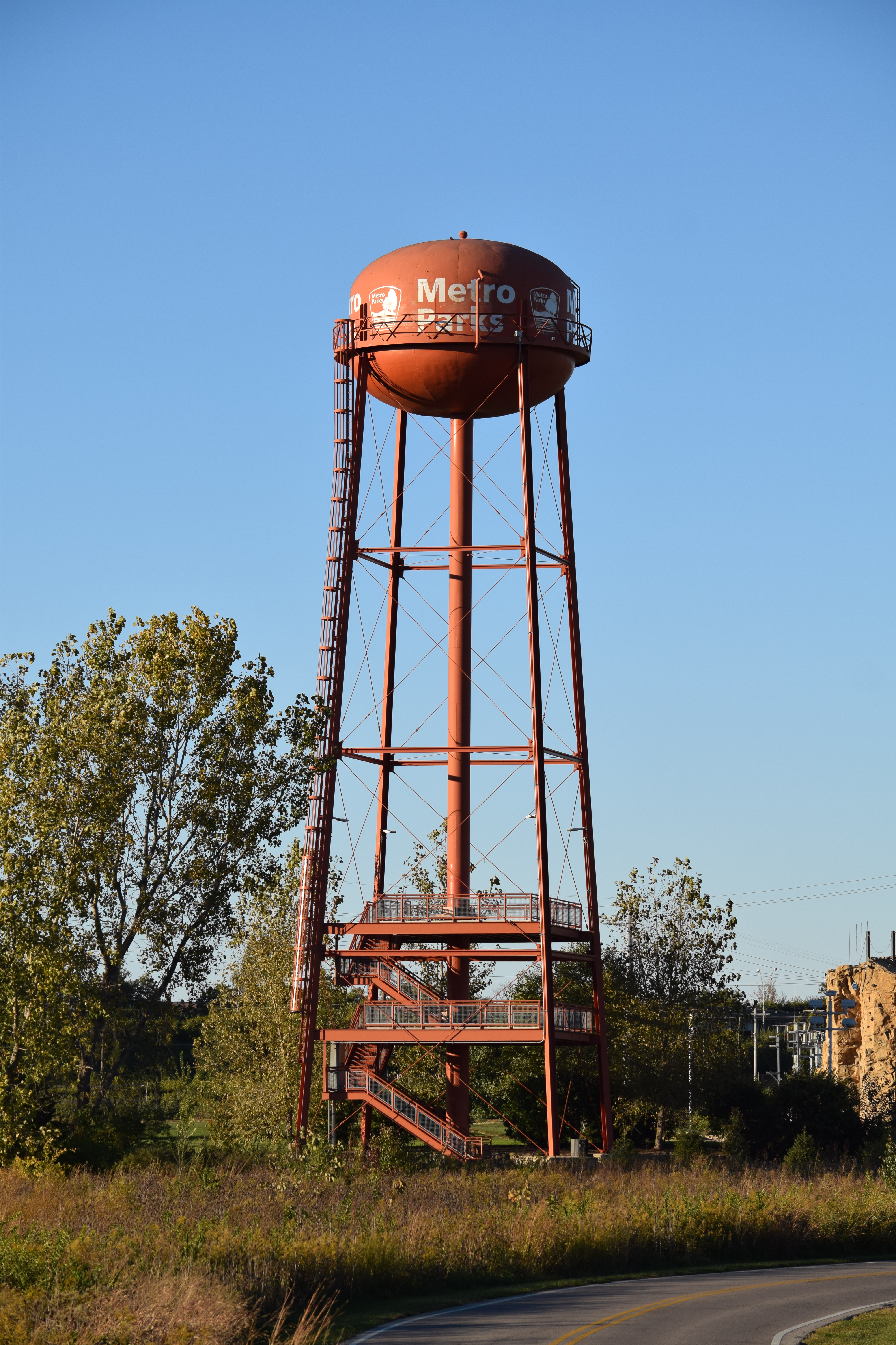 Scioto Audubon Metro Park